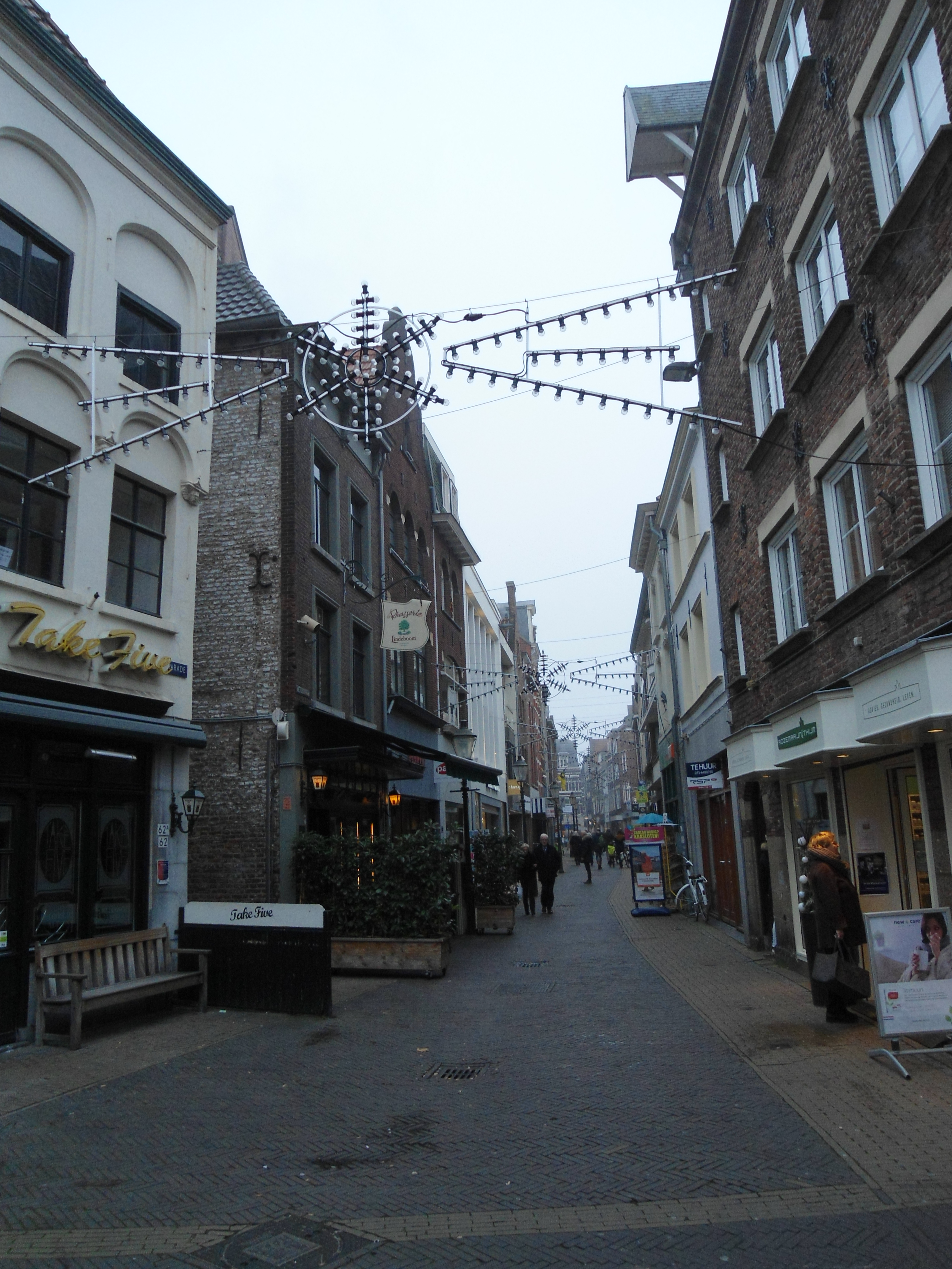 De Klaasstraat vanuit de Parade gezien